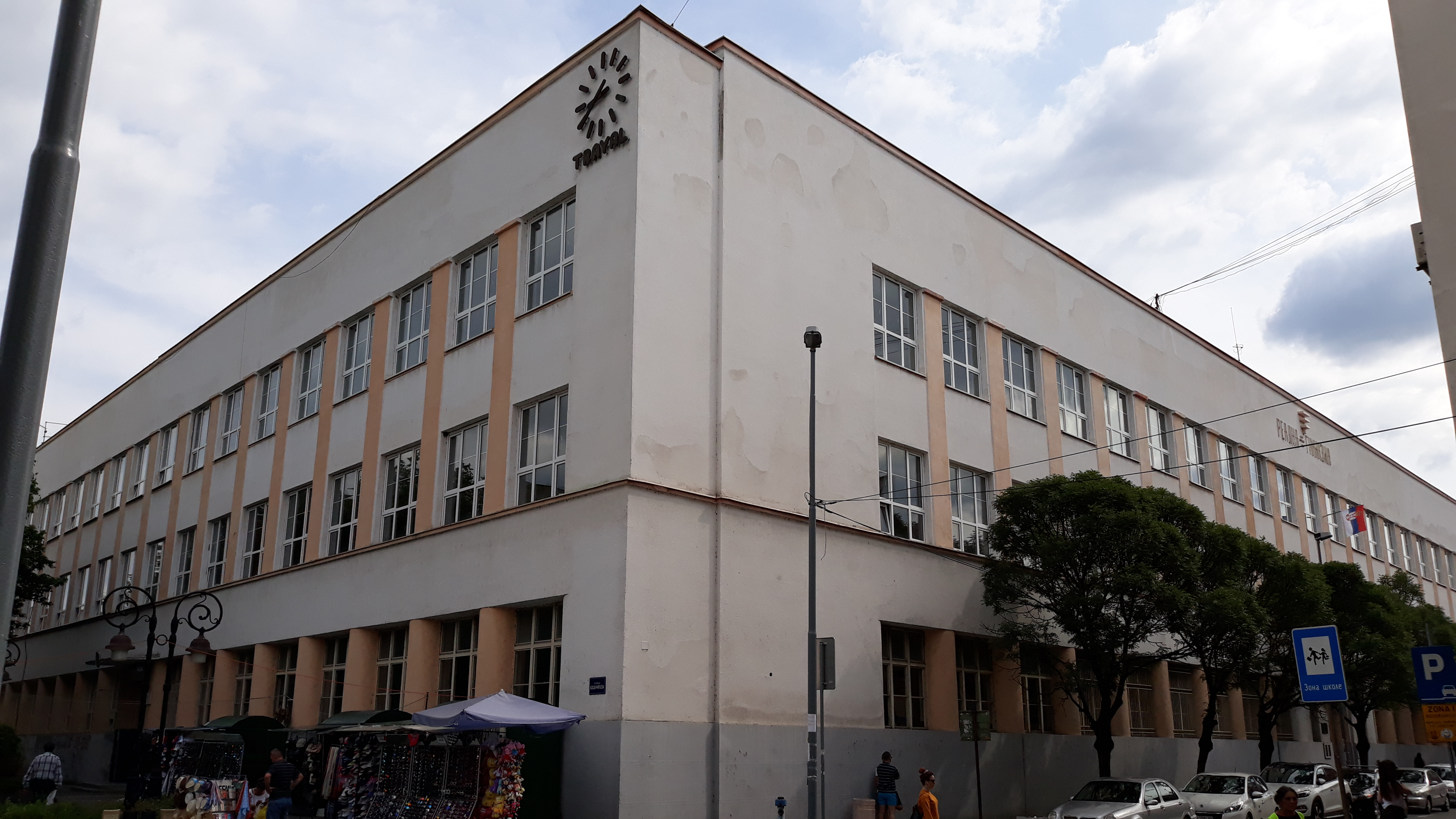 Зграда крушевачке Гимназије